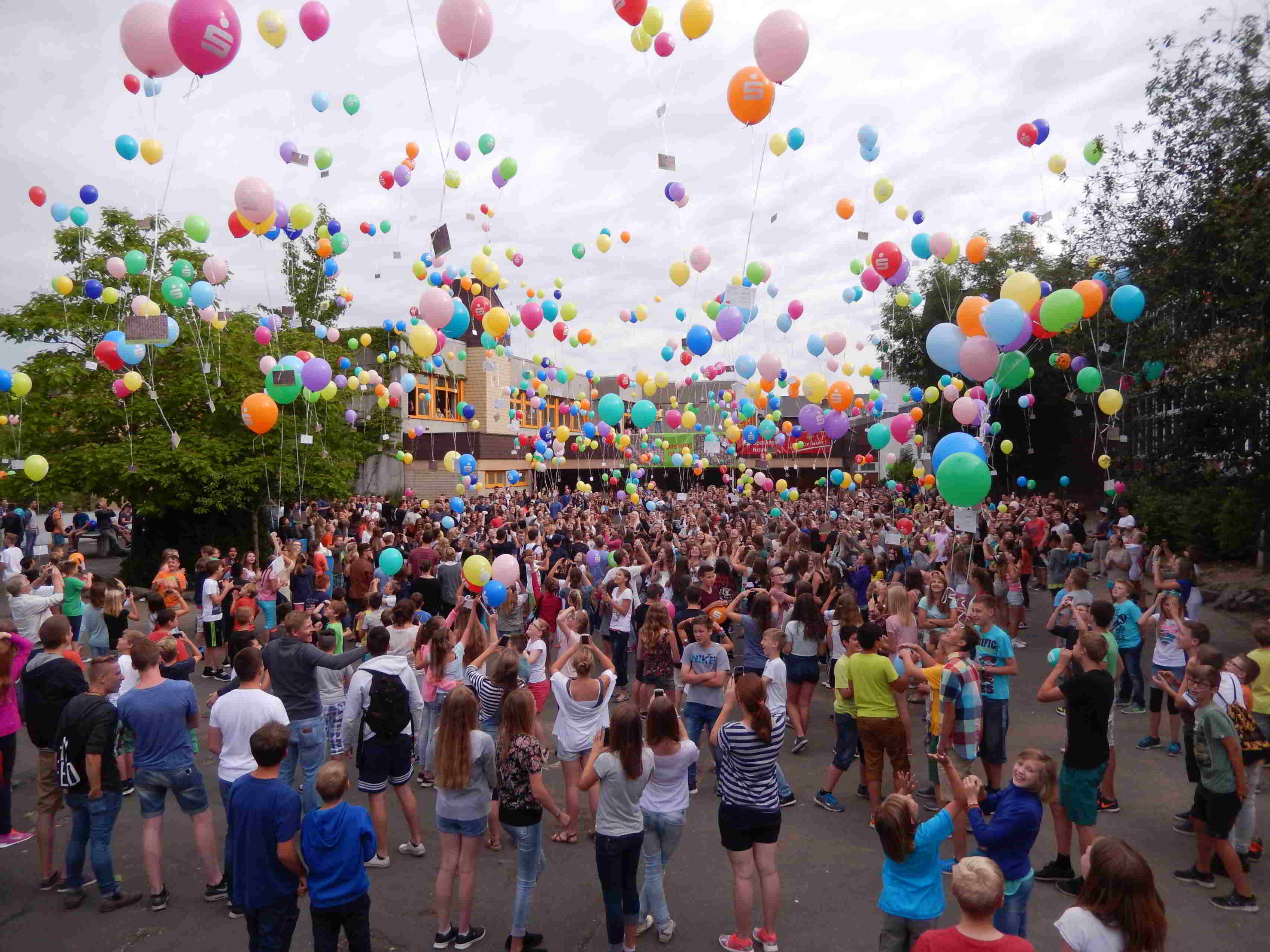 Luftballon Aktion der Schülervertretung unter dem Motto "Das WTG ist bunt"